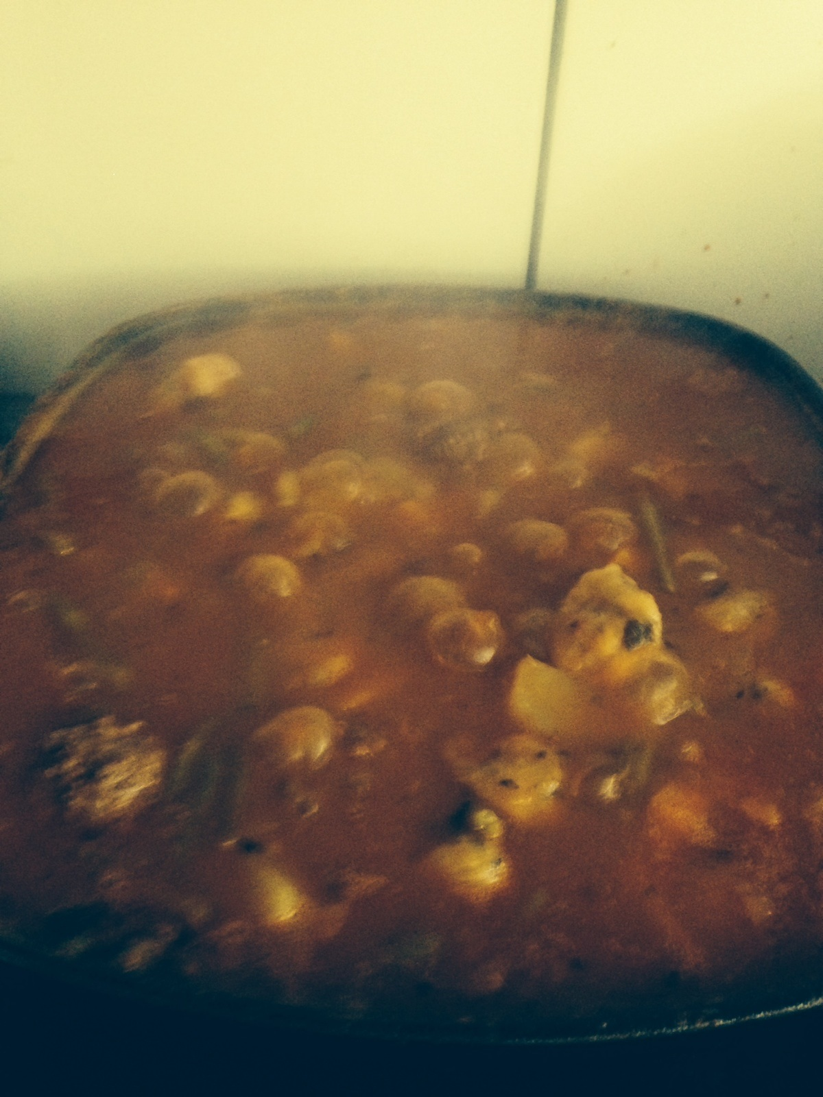 Taasbante de la region de Sidi Aich